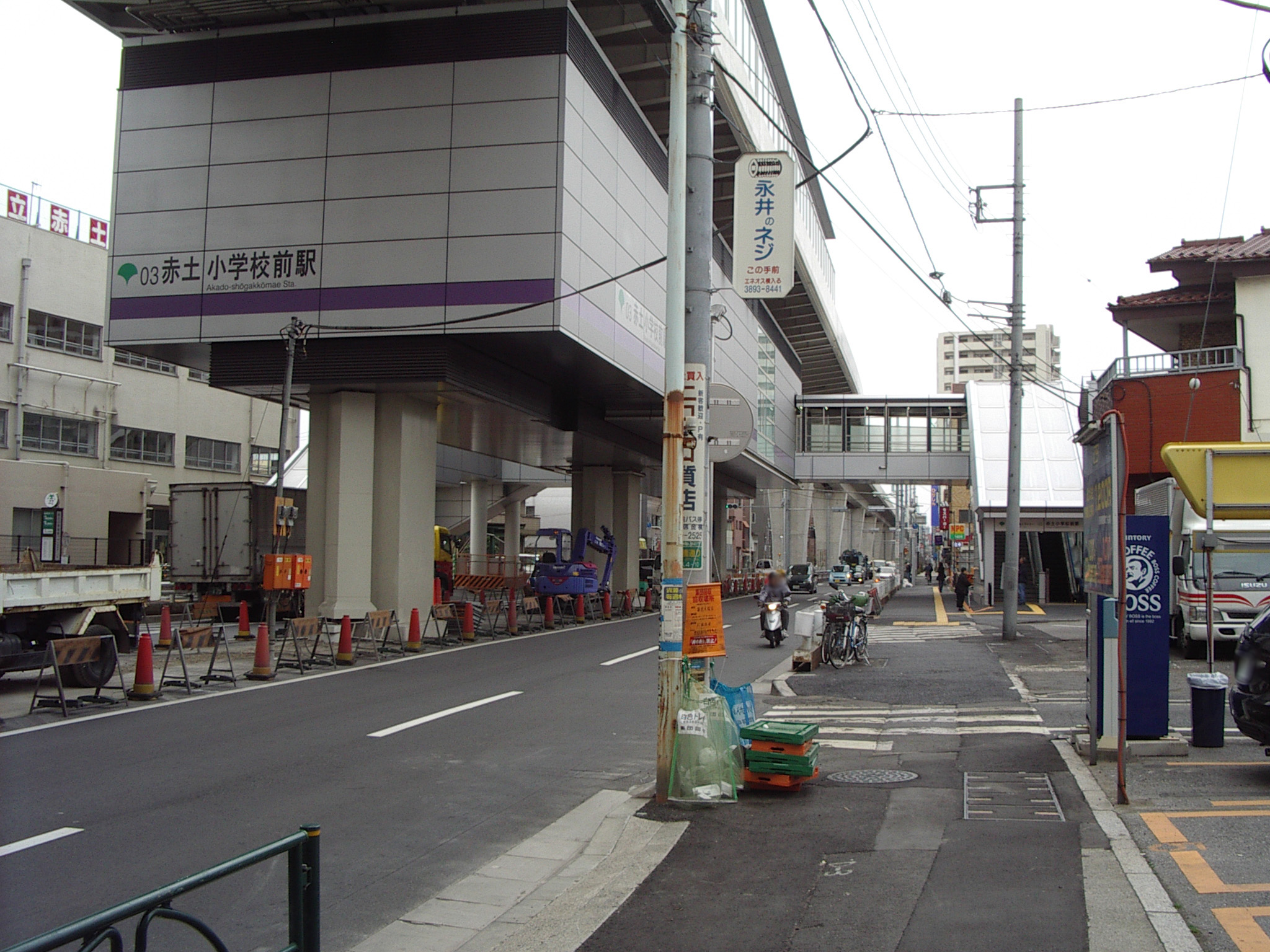 日暮里・舎人ライナー赤土小学校前駅